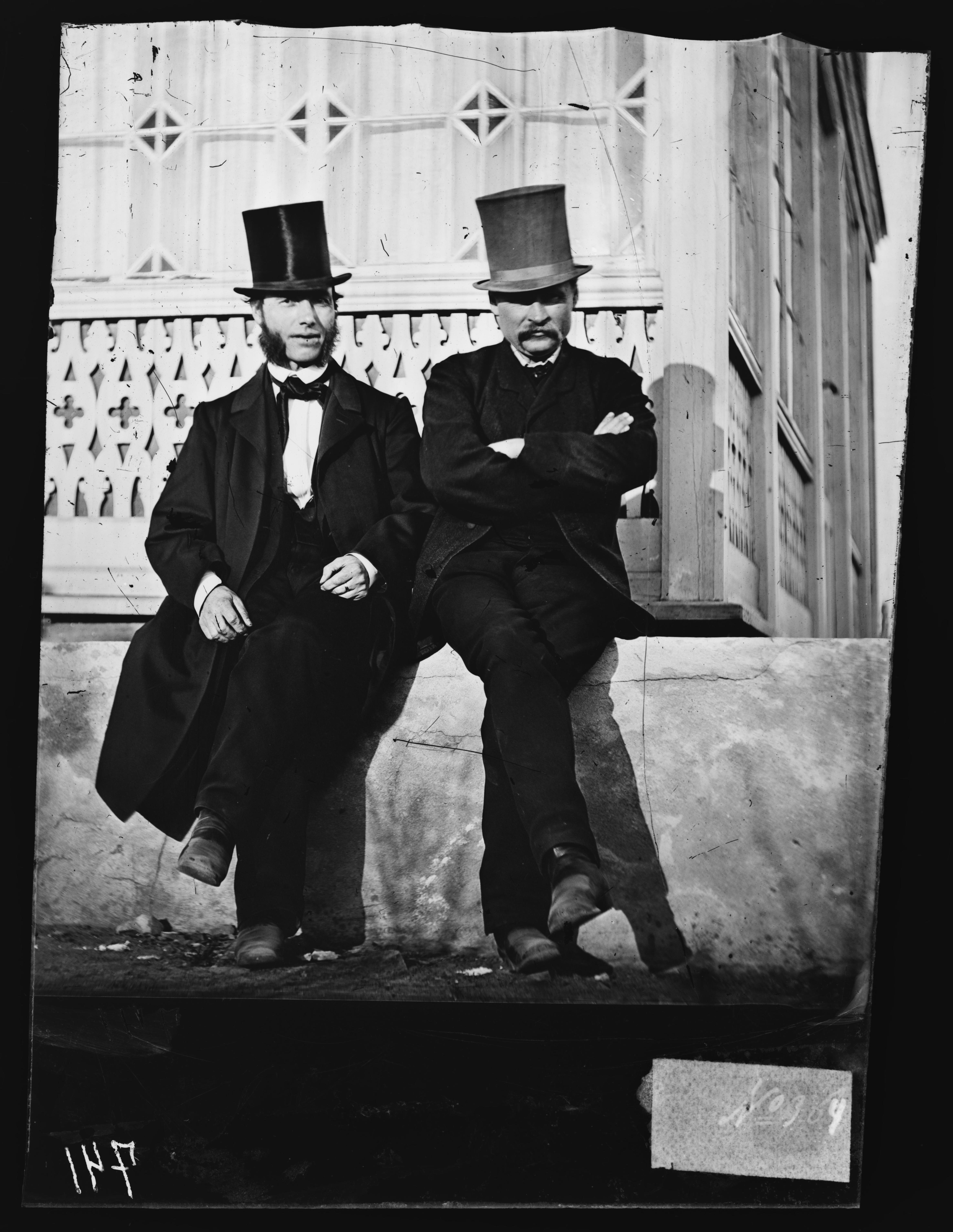 Sted: Kommune: Fylke: Tagger